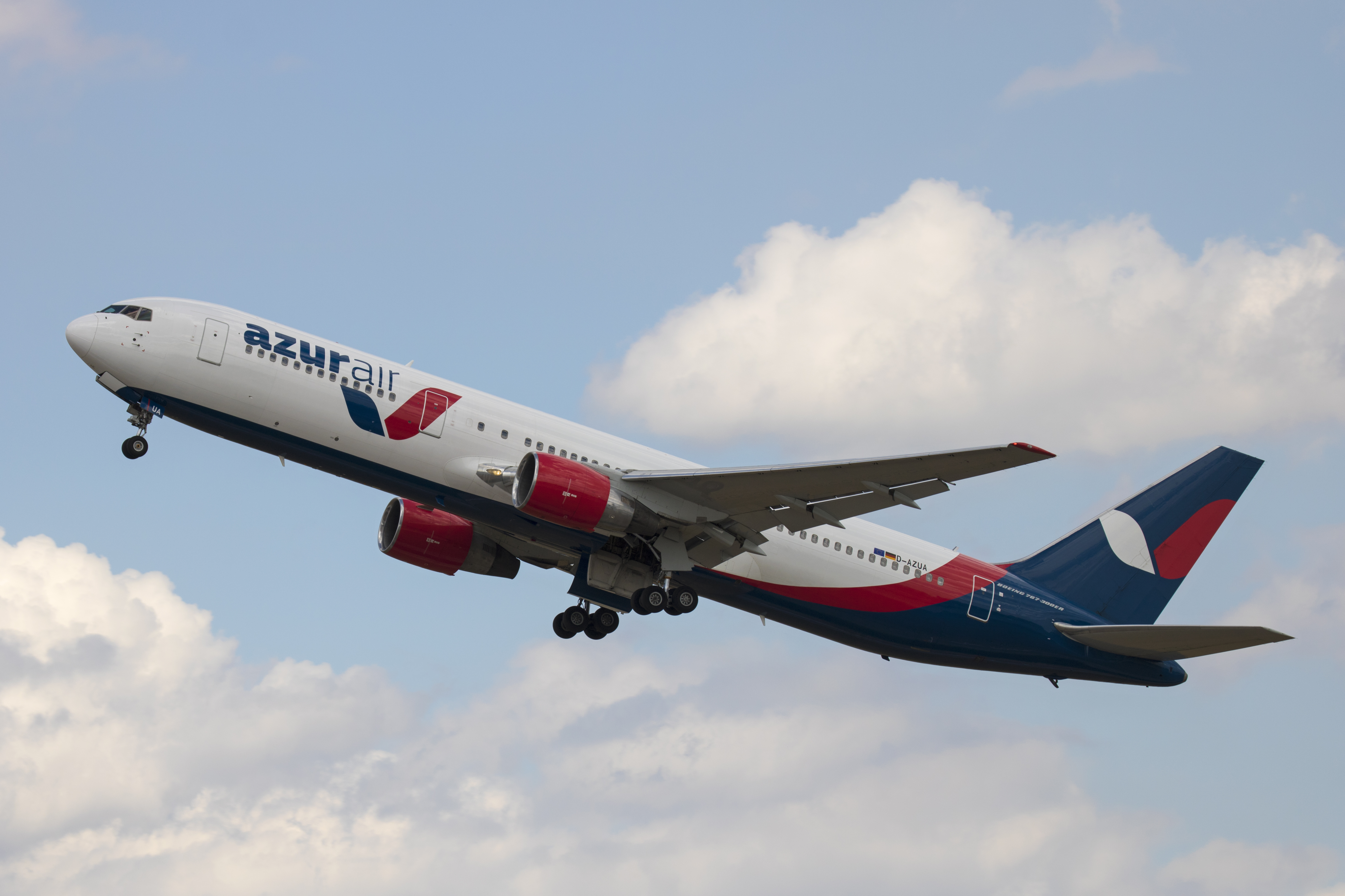 Flughafen Düsseldorf, Boeing 767-300ER (D-AZUA) der Azur Air Germany